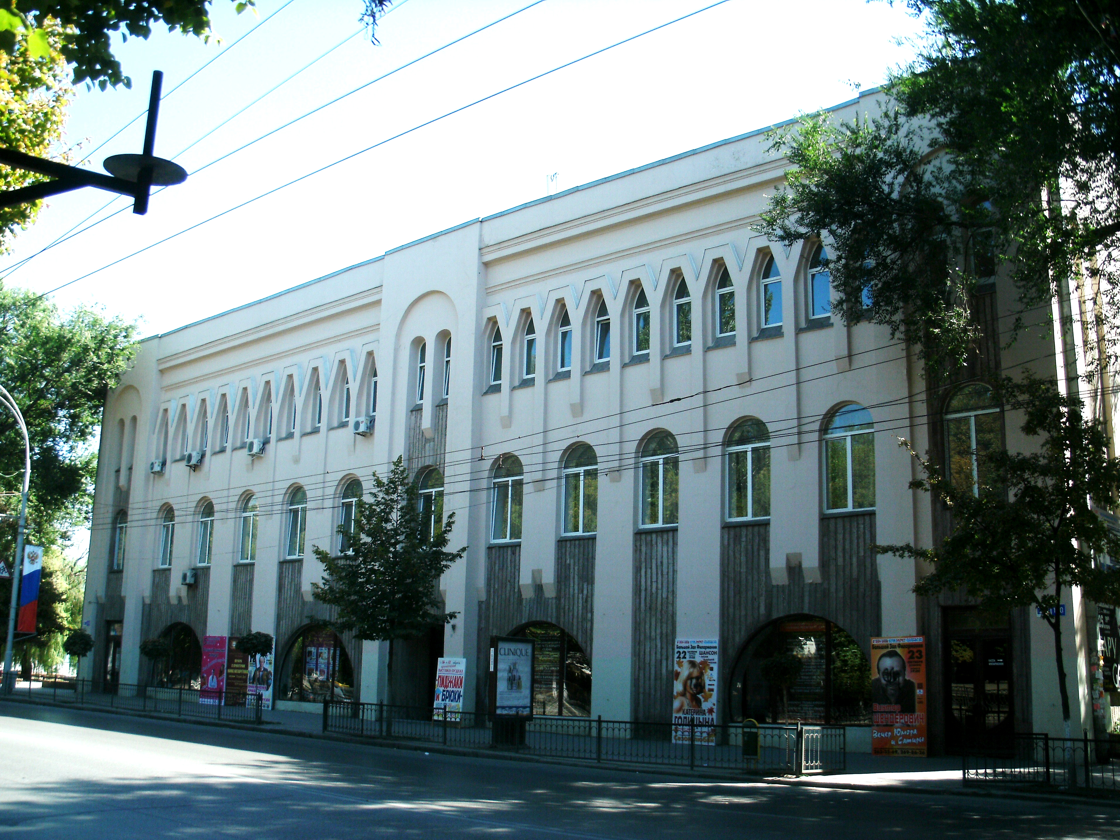 Ростовская филармония (Ростов-на-Дону)